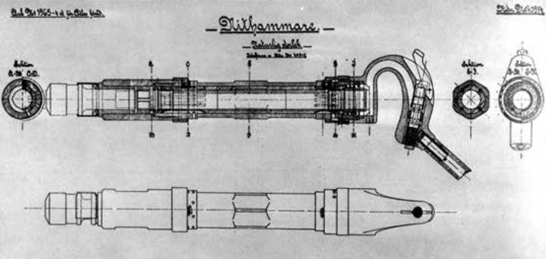 Ritning till en nithammare av märke AB Nya Atlas